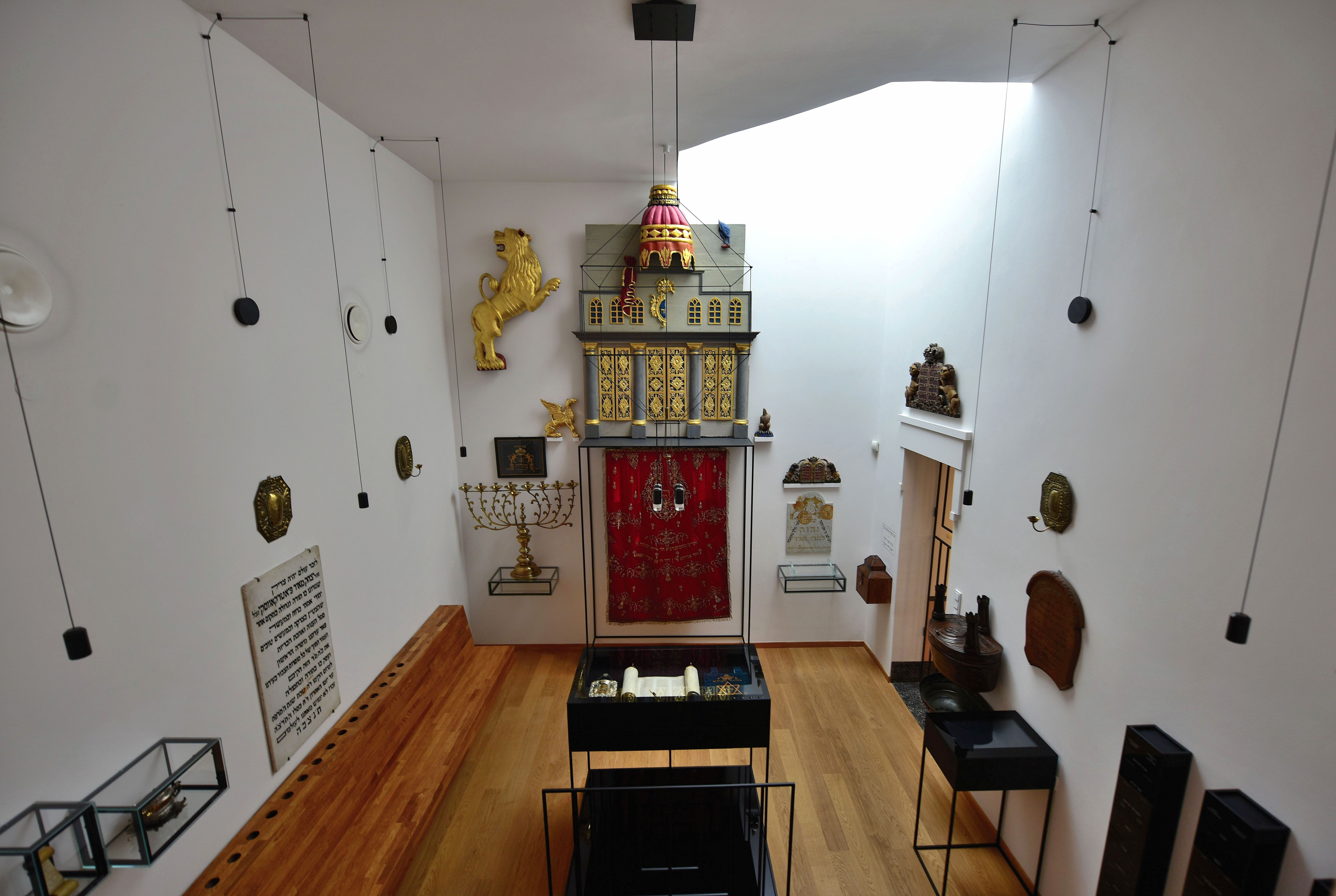 Ekspozycja Dom modlitwy (bejt tfila) w Żydowskim Instytutcie Historycznym w Warszawie